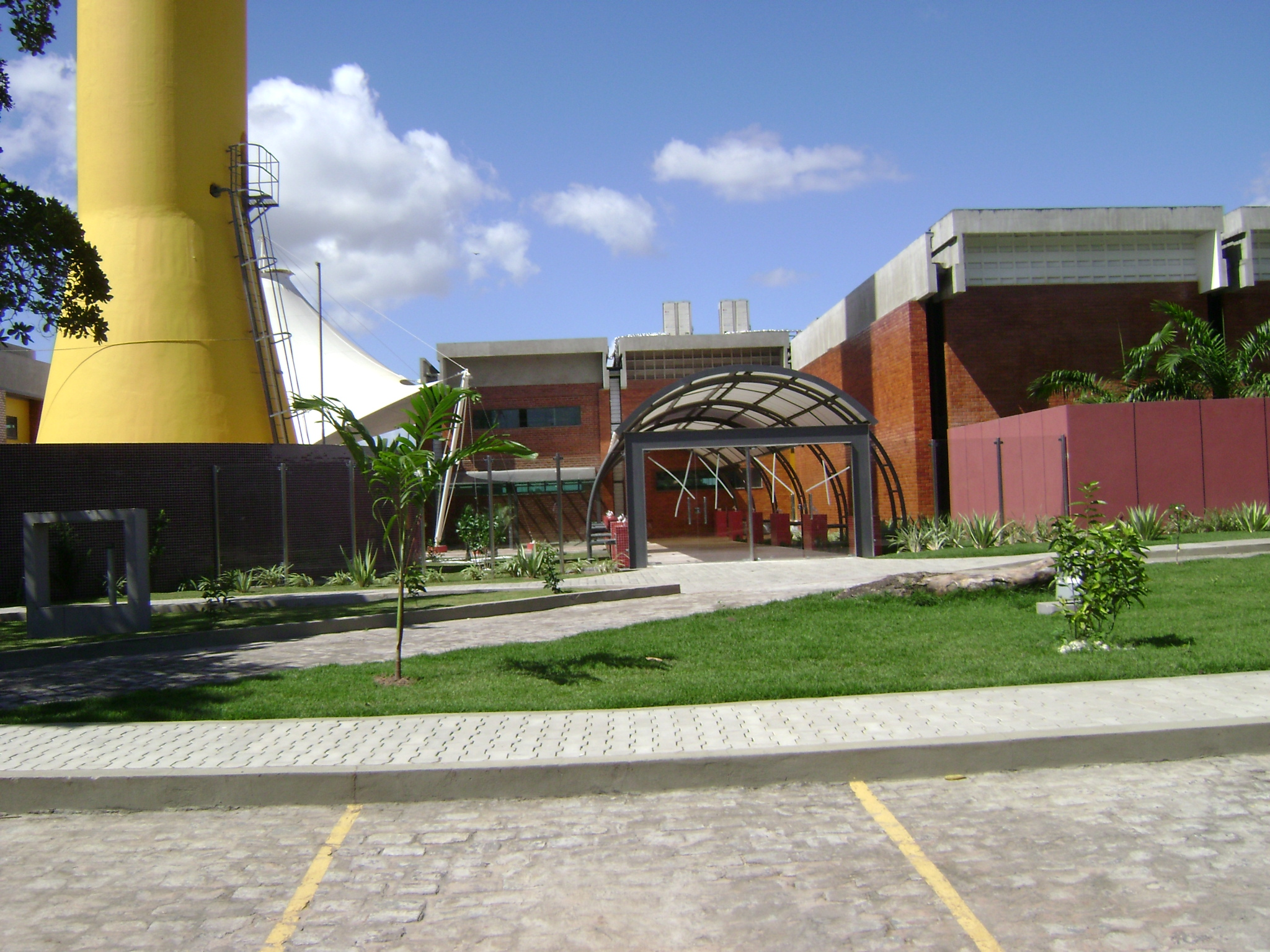 Edificação na entrada no Espaço Olimpo, em Feira de Santana, Bahia, Brasil.